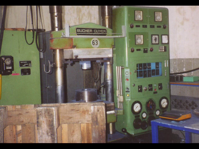 Duroplastpresse